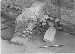 Scavi archeologici presso Mozia - ritrovamento dell'Efebo di Mozia